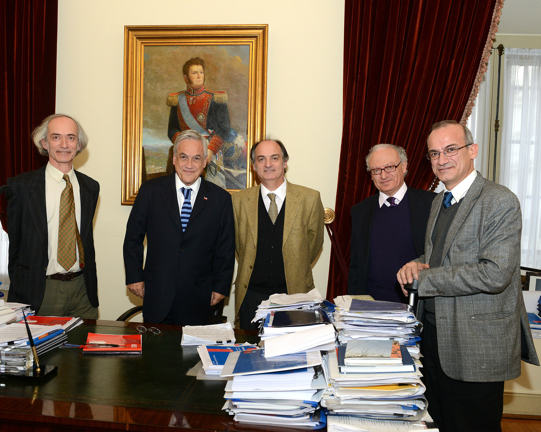 Hermanos Mosciatti reunidos con Sebastián Piñera.